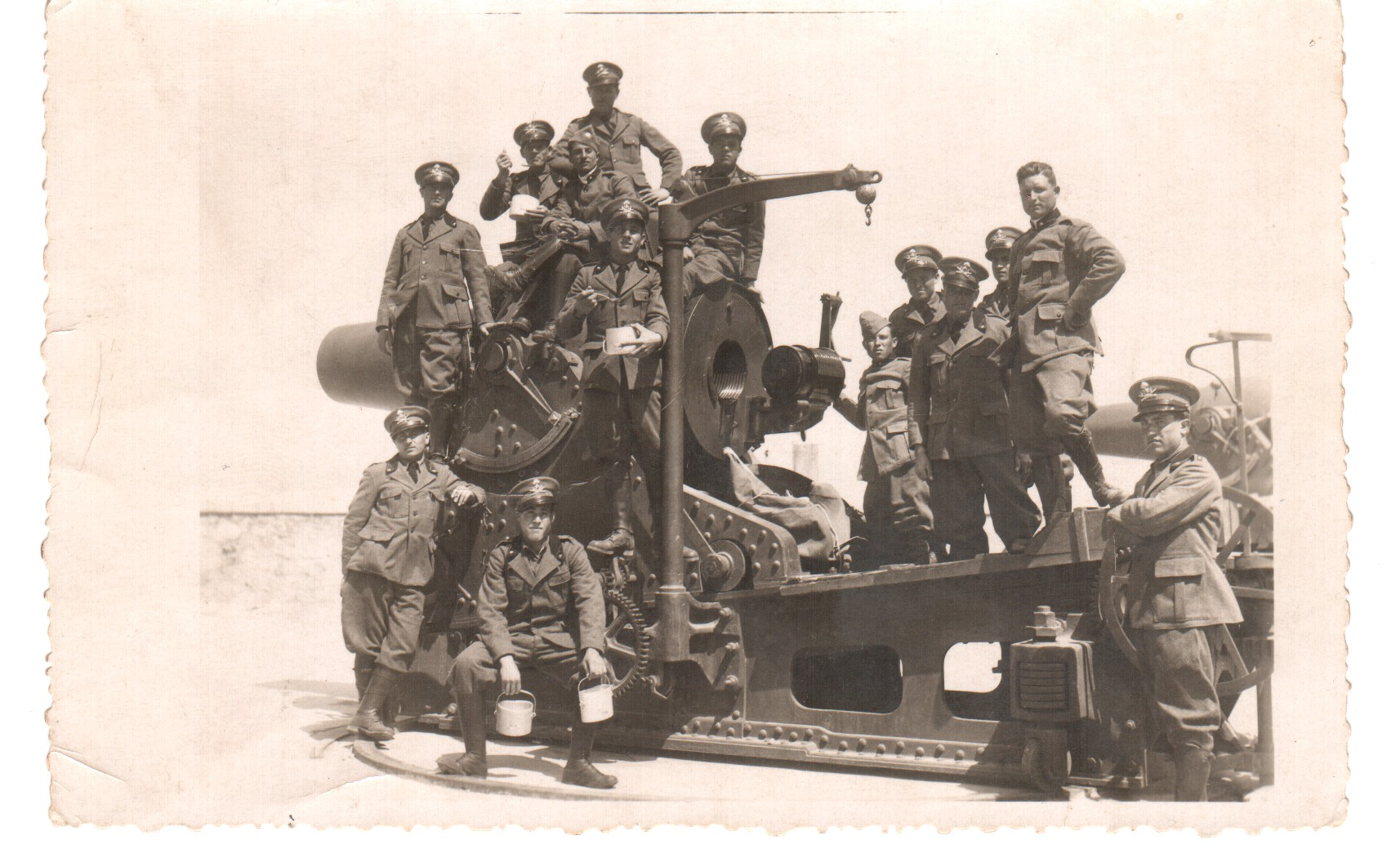 Cannone fisso di grosso calibro fotografato a Rodi, durante la seconda guerra mondiale; in posa un gruppo di militari del Regio Esercito, presumibilmente artiglieria;il cannone è presumibilmente un 149/12